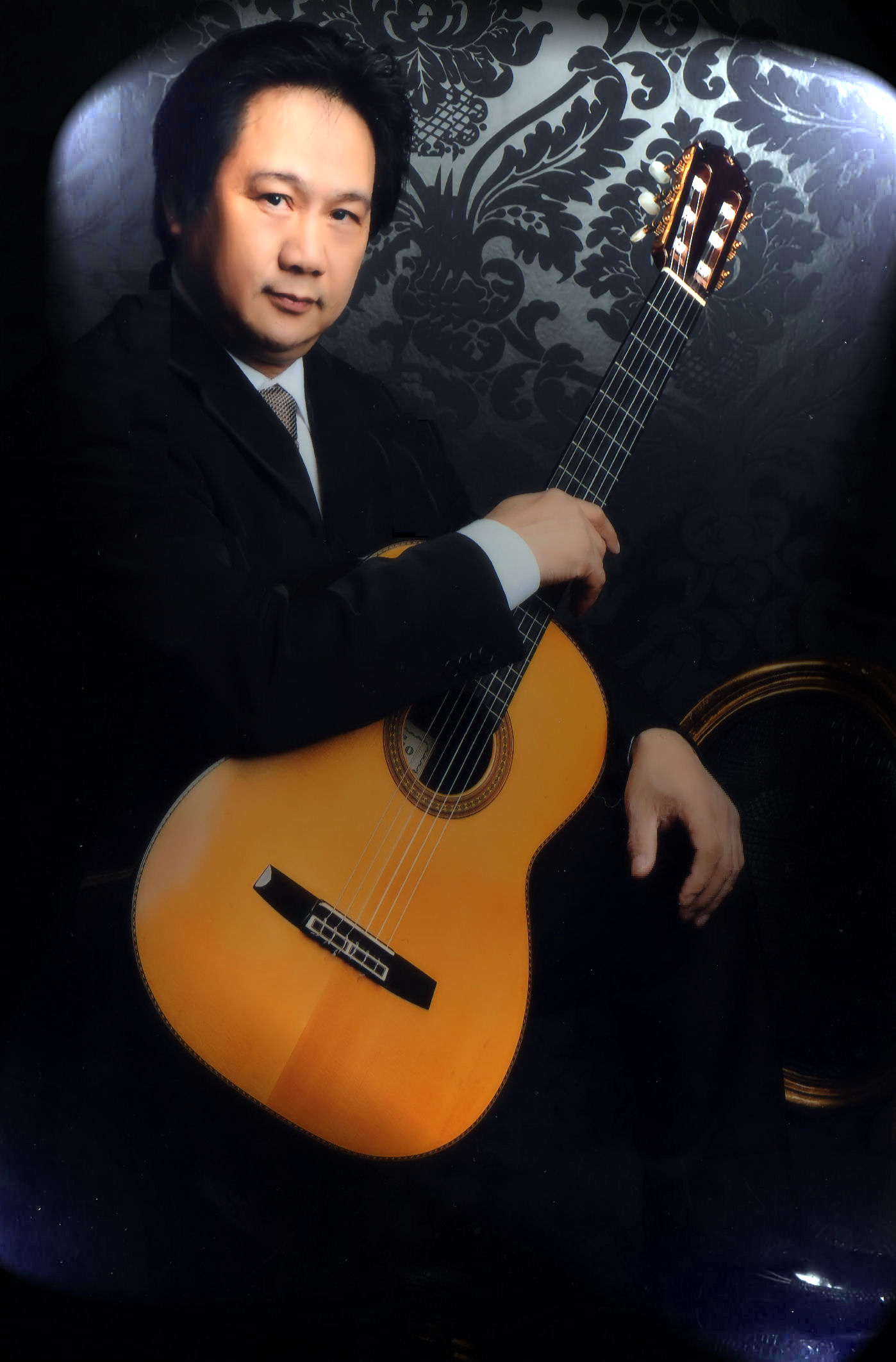 Prof. Dang Ngoc Long